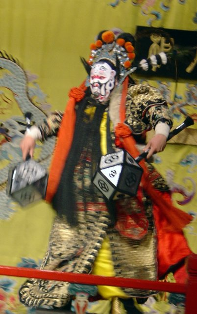 Photo:CMarmonier